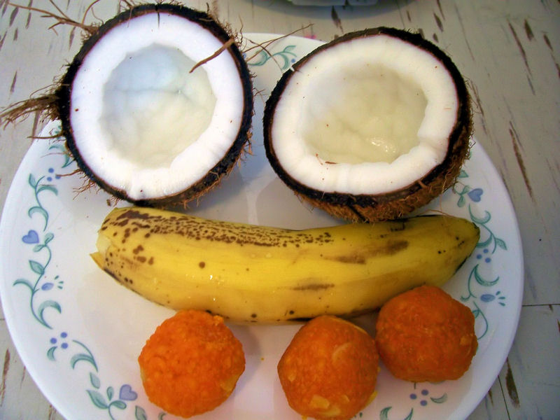 Bhoga (Prasad), Offerings for Puja (Prayer)